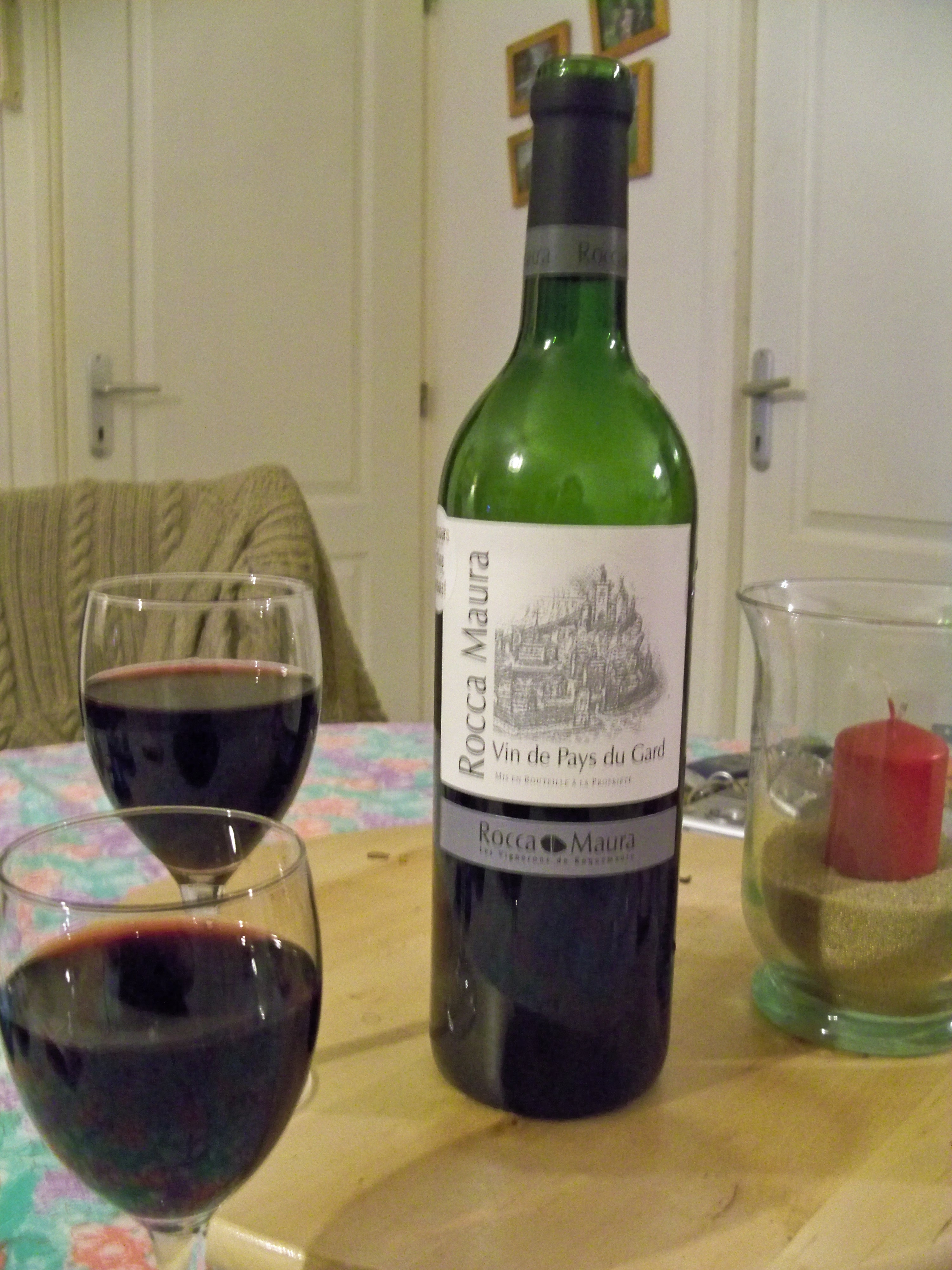 Rocca Maura, Vin de Pays du Gard